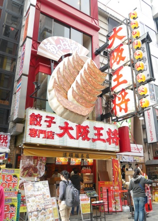 店舗写真（外観）